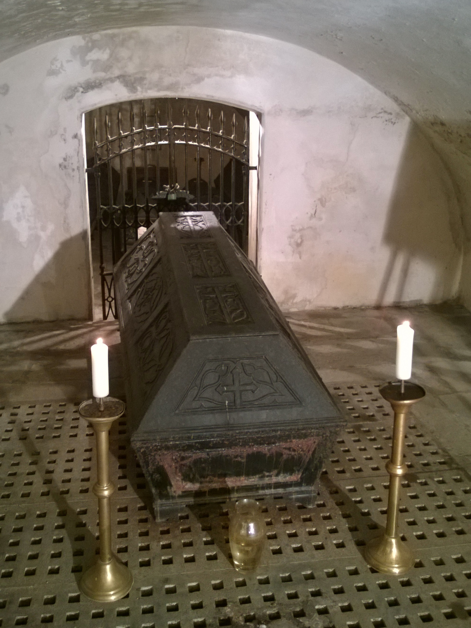 Kostel Nejsvětější Trojice (Loukov), J strana návsi, Loukov, Loukov (okres Mladá Boleslav).